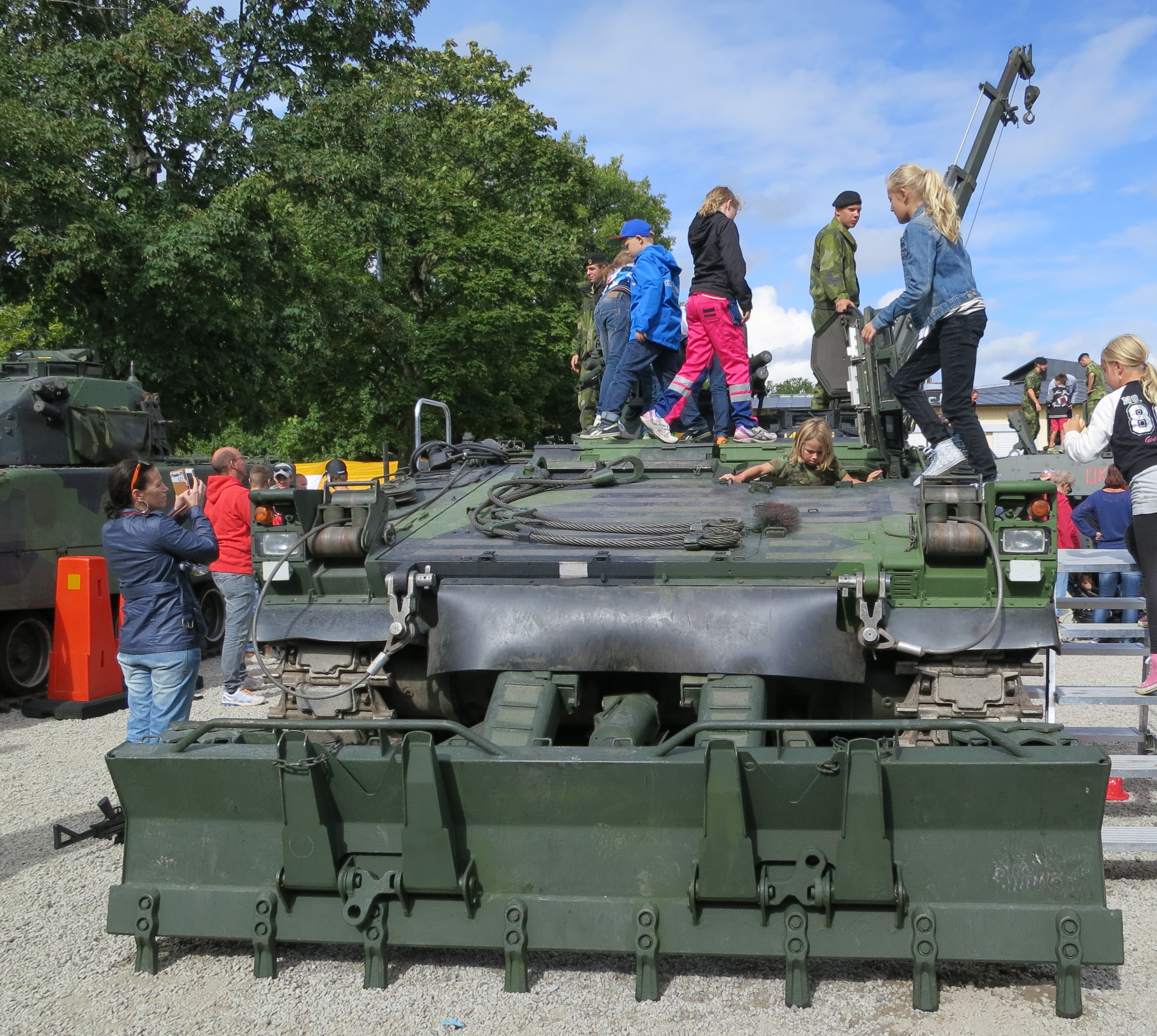 Bärgningsbandvagn 90